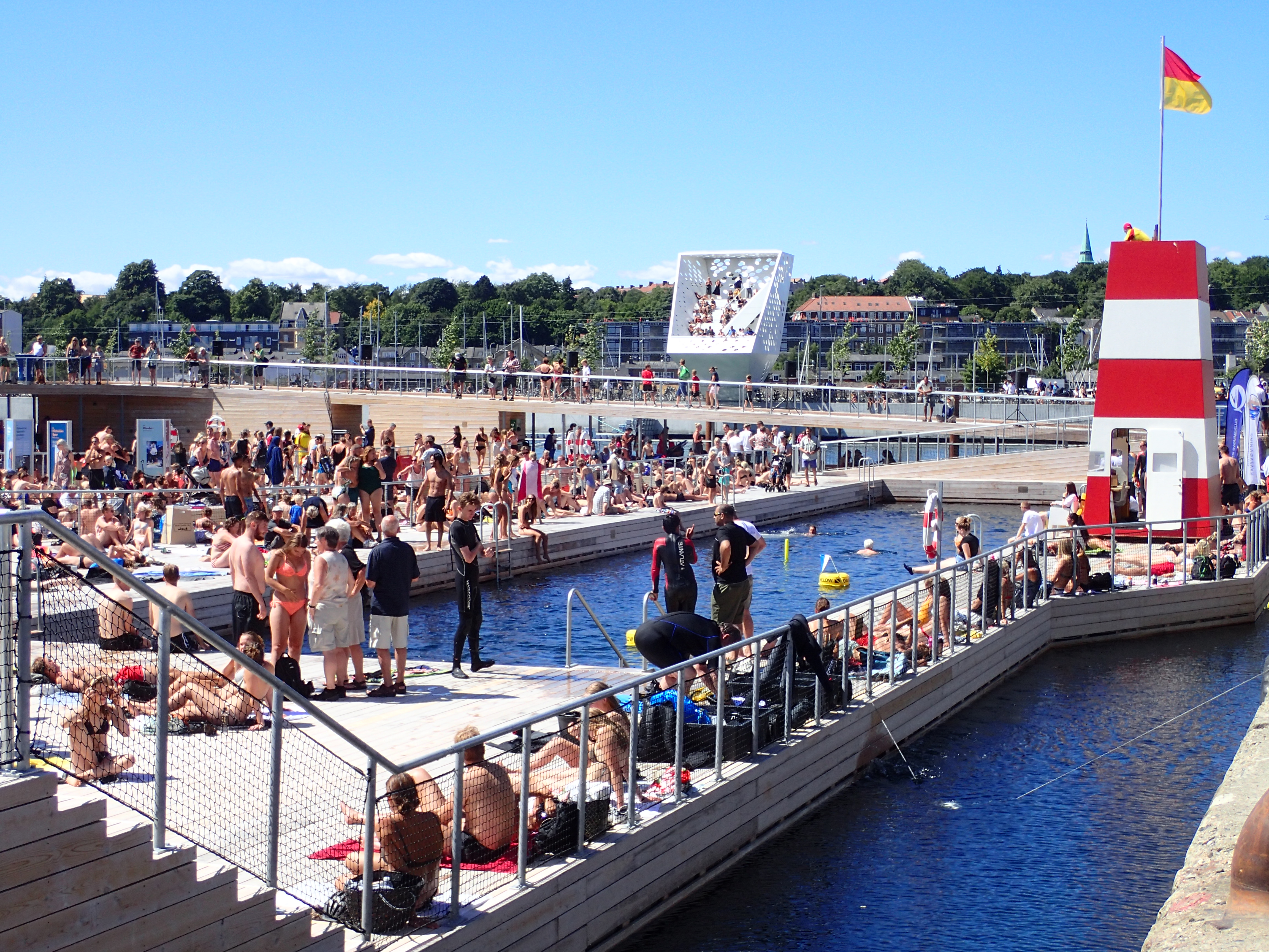 Aarhus Havnebad på åbningsdagen 30. juni 2018. Udsigt til livreddertårnet og den hvide skulptur Tårnet af Dorte Mandrup.